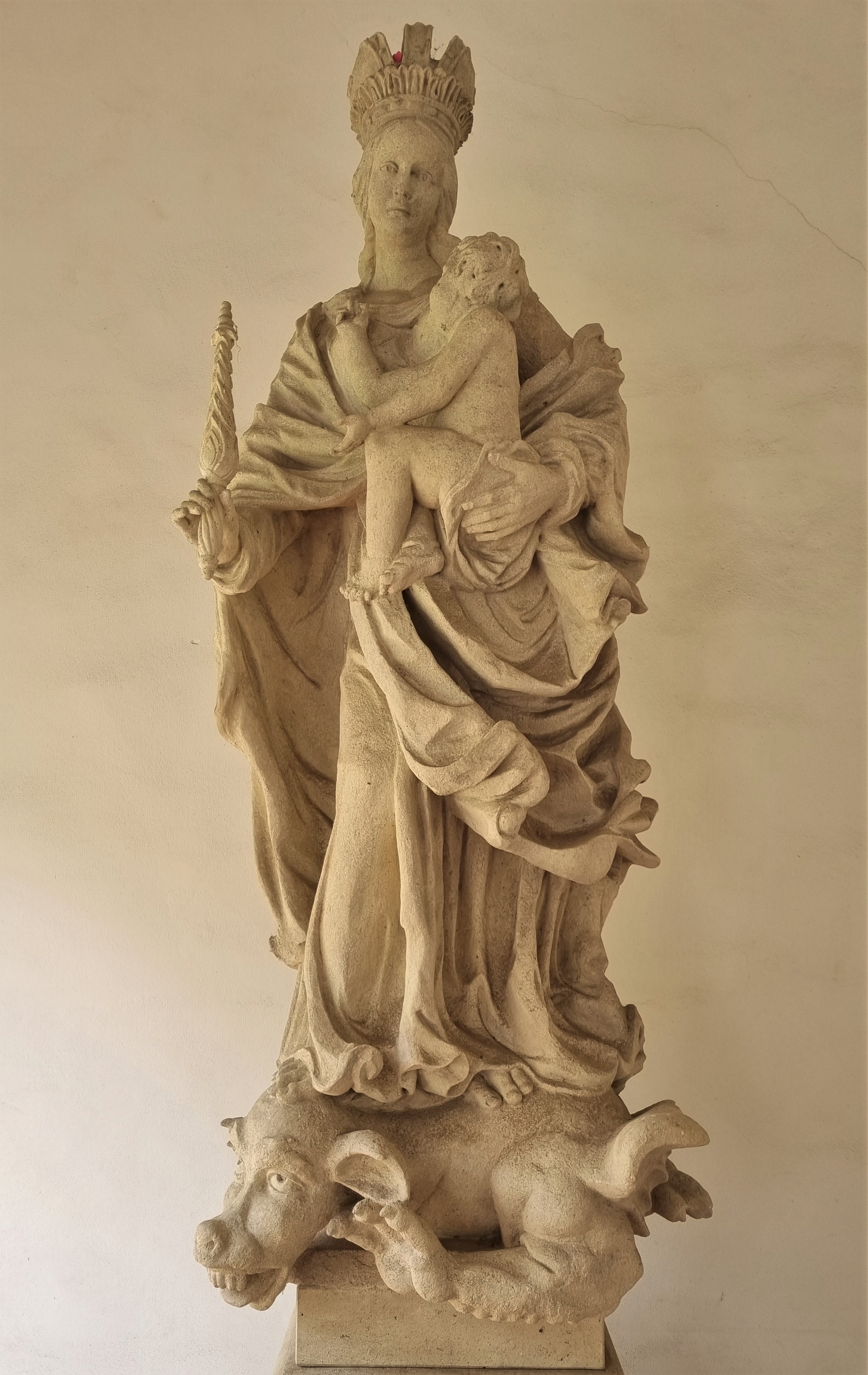 Socha Panny Marie s Ježíškem z morového sloupu v Brně - Ferdinand Pfaundler (1679–1681), lapidárium augustiniánského kláštera na Starém Brně